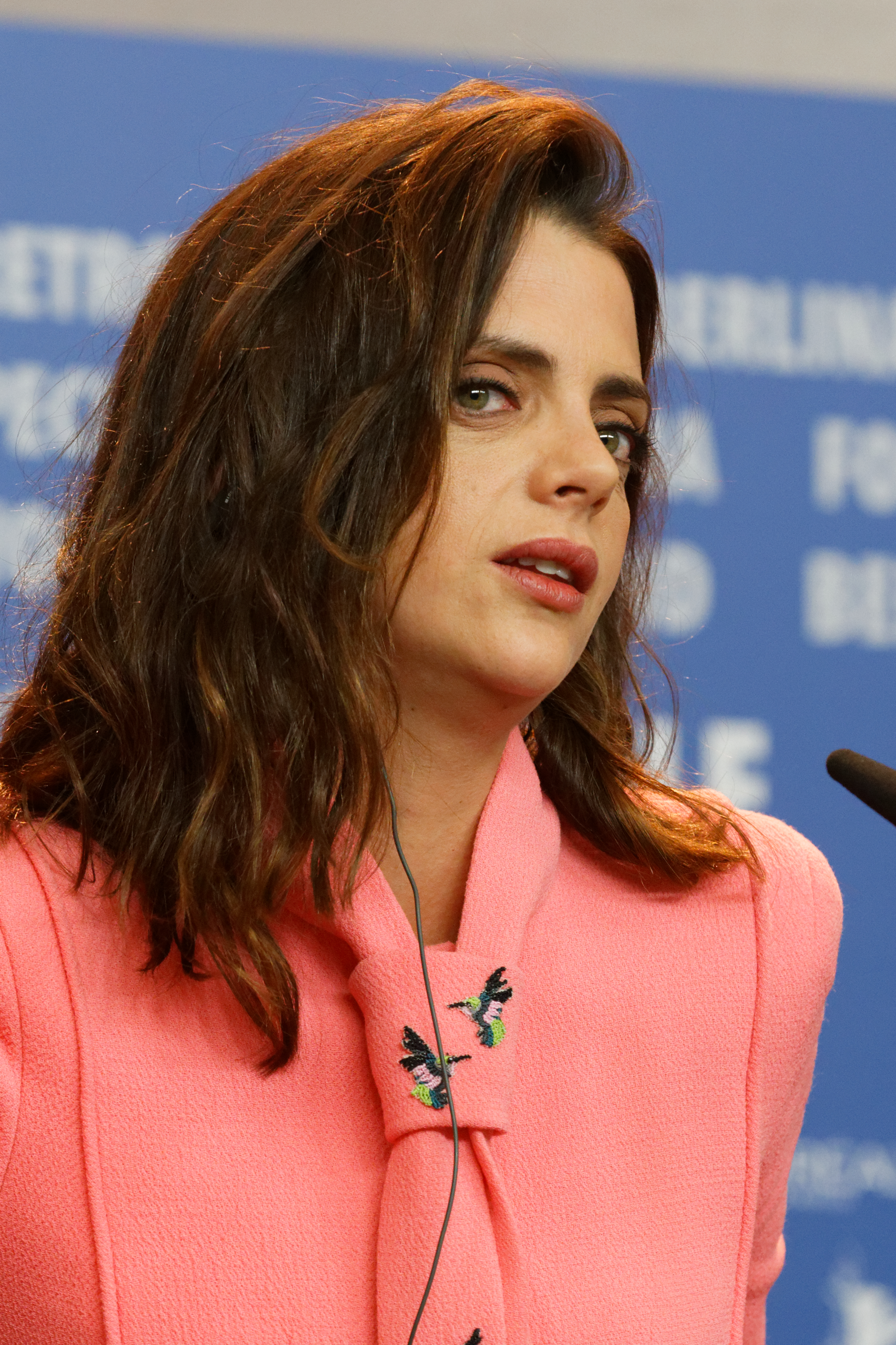 Macarena Gómez in der Pressekonferenz zu Skin bei der Berlinale 2017